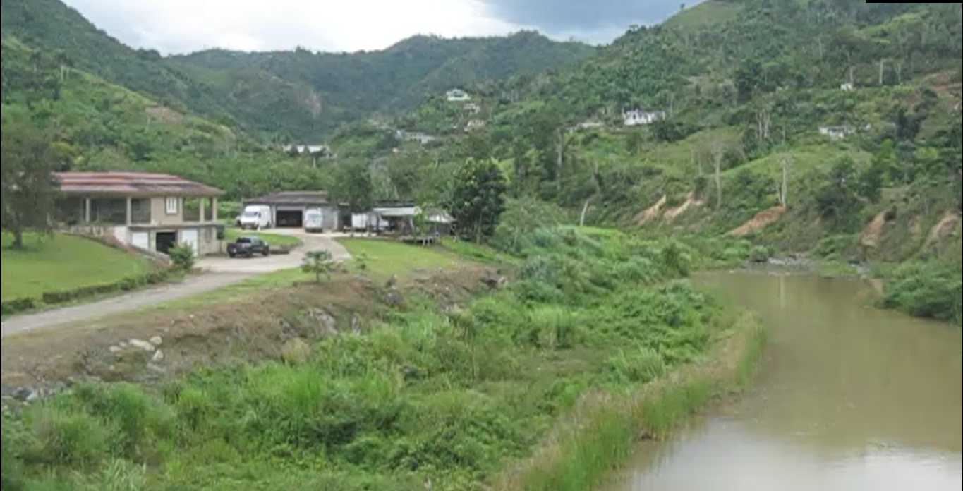 En la Carretera 155, cerca del km 42.6 barrio Río Grande, Sector La Playita en Morovis, Puerto Rico